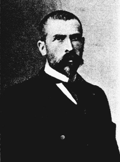 Pierre Paul Émile Roux